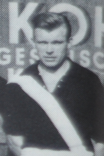 Spielerfoto Anton Beran - SK Sturm Graz, 1955